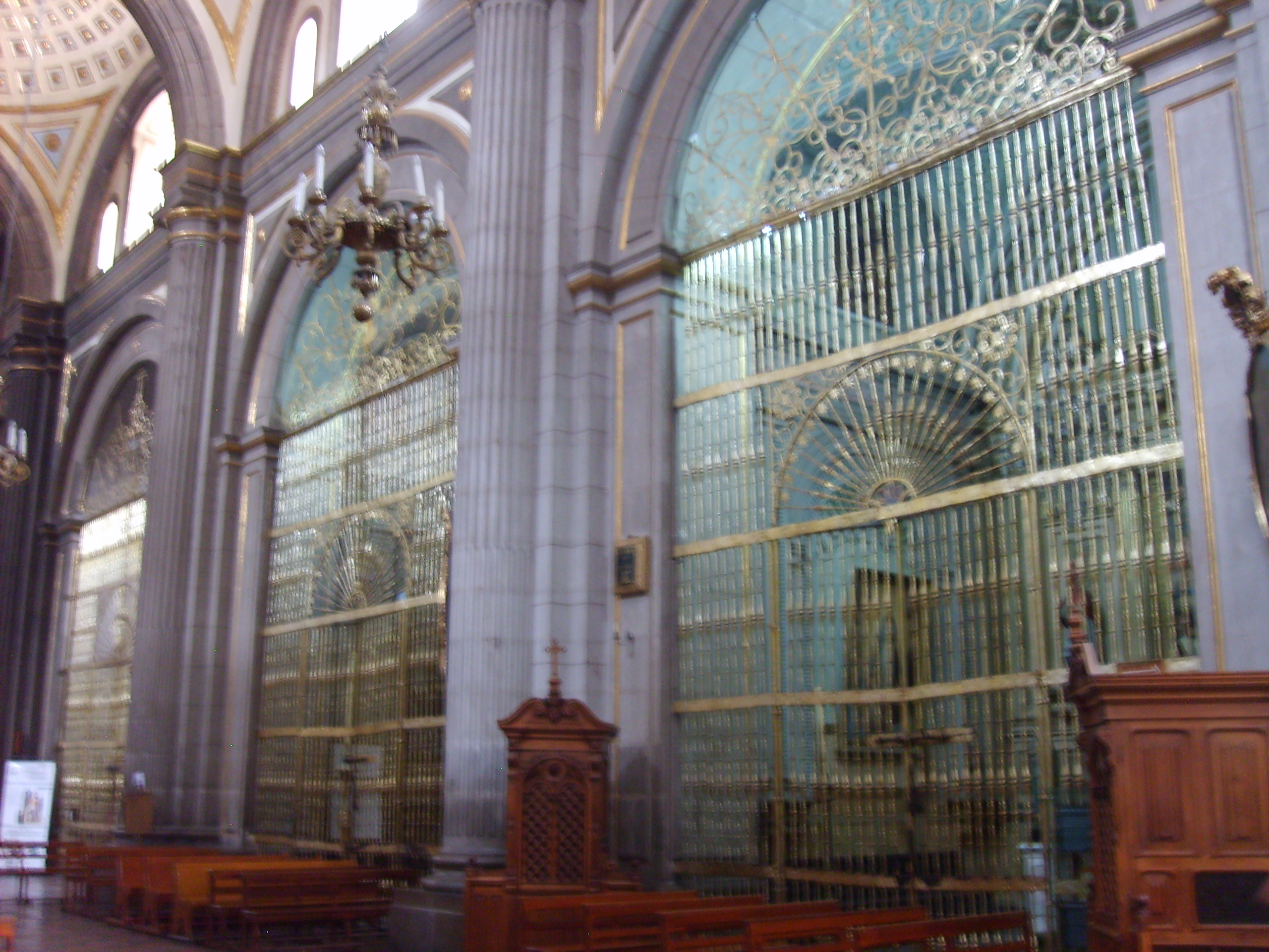 Capillas de la Catedral de Puebla — México.